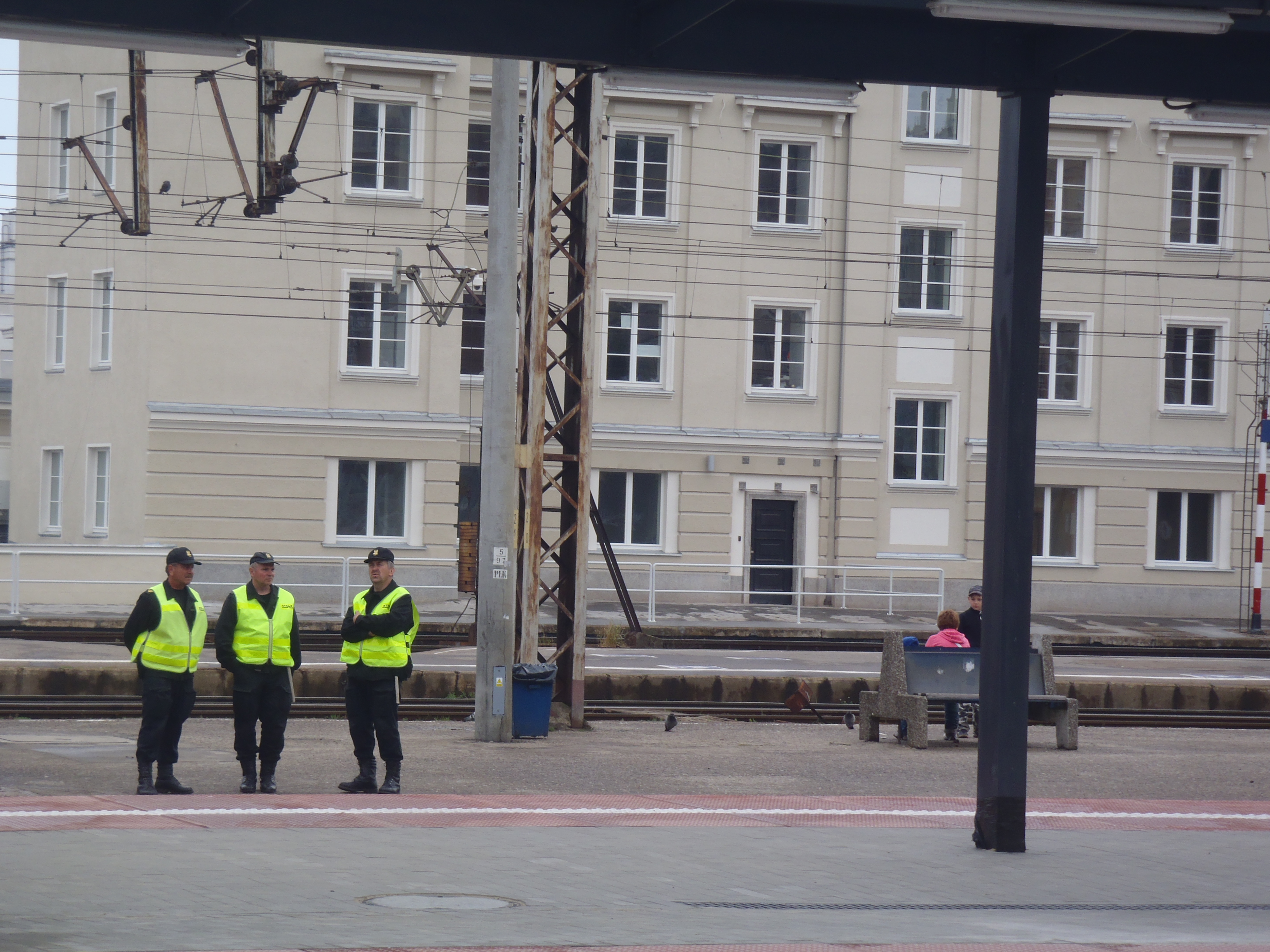 Trzech funkcjonariuszy Straży Ochrony Kolei podczas realizacji zadań służbowych na terenie stacji Gdynia Główna